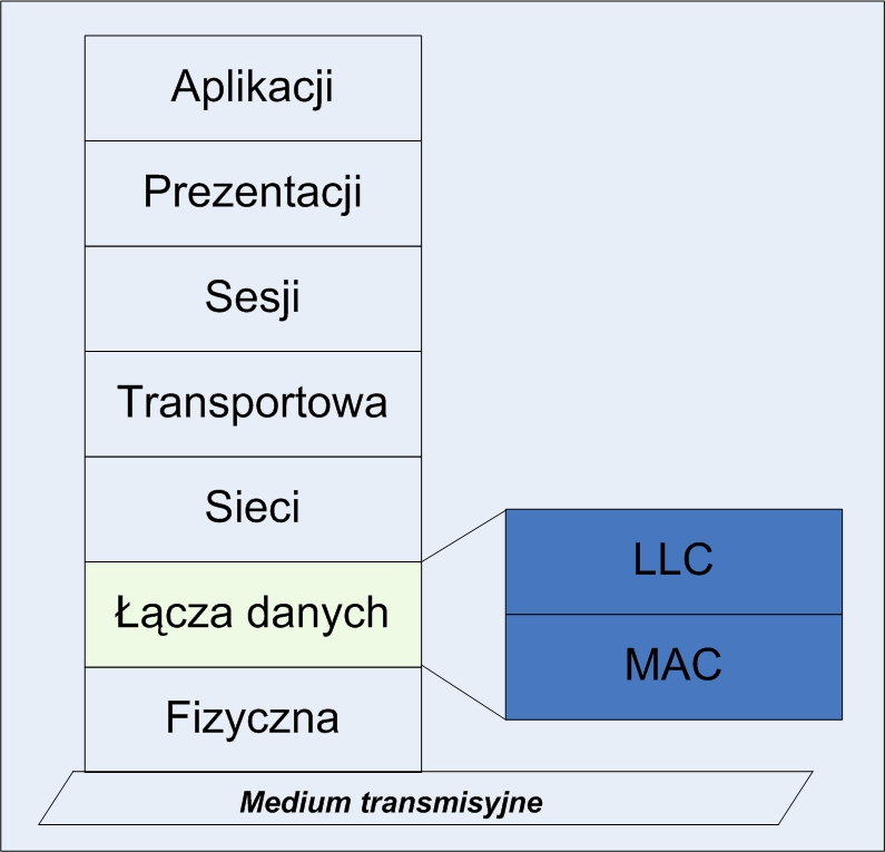 Schemat przedstawia budowę modelu ISO/OSI z uwzględnieniem podwarstw LLC i MAC warstwy łącza danych., Autor: Michał Klimek, Data: 19.01.2007